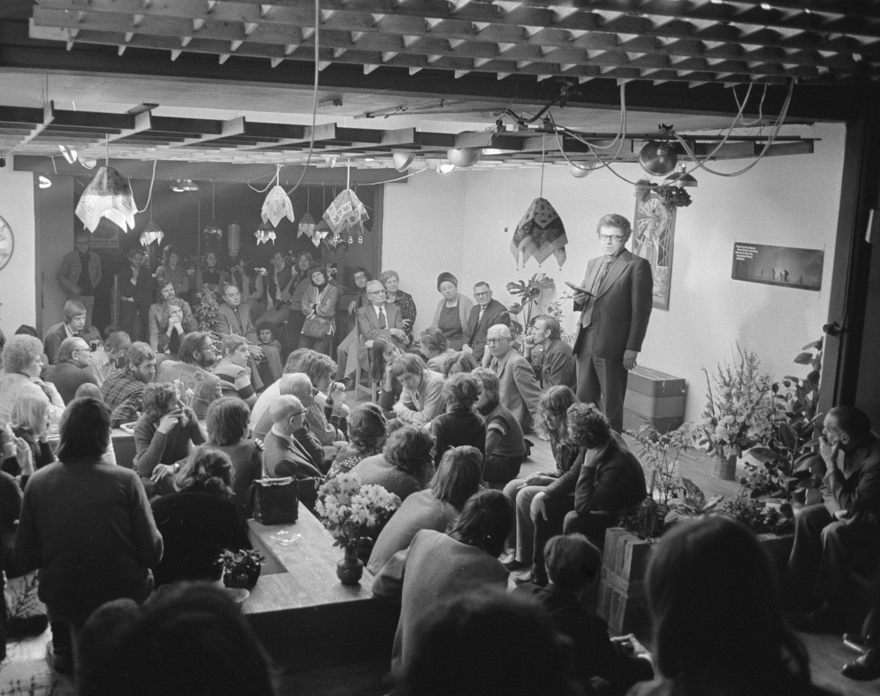 Collectie / Archief : Fotocollectie Anefo Reportage / Serie : [ onbekend ] Beschrijving : Koffiebar van Youth for Christ geopend in Jan Steenstraat Amsterdam; directeur van Youth for Christ ds. G. Brucks tijdens openingsgebed / Datum : 15 februari 1975 Locatie : Amsterdam, Noord-Holland Trefwoorden : koffiebars Instellingsnaam : Youth for Christ Fotograaf : Bogaerts, Rob / Anefo Auteursrechthebbende : Nationaal Archief Materiaalsoort : Negatief (zwart/wit) Nummer archiefinventaris : bekijk toegang 2.24.01.05 Bestanddeelnummer : 927-7583